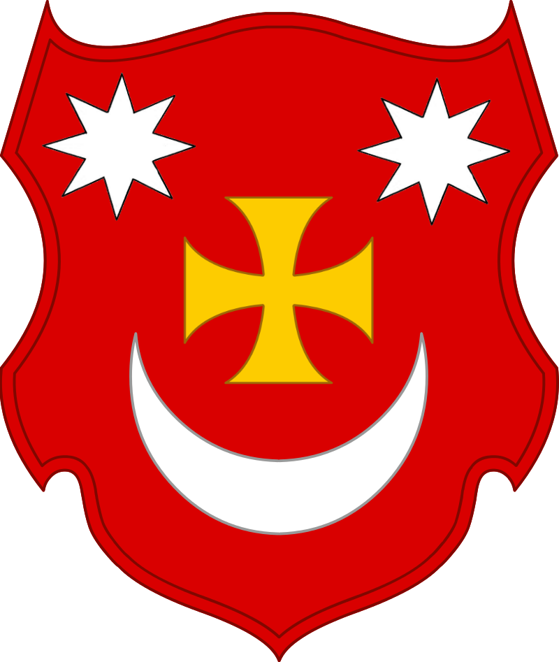 Герб Борзнянської сотні (реконструкція) на основі: Желіба О.// Знак.- 1999.- Ч.18 – Желіба О. Полкові та сотенні печатки Ніжинського полку // Знак.- 1999.- Ч.18.